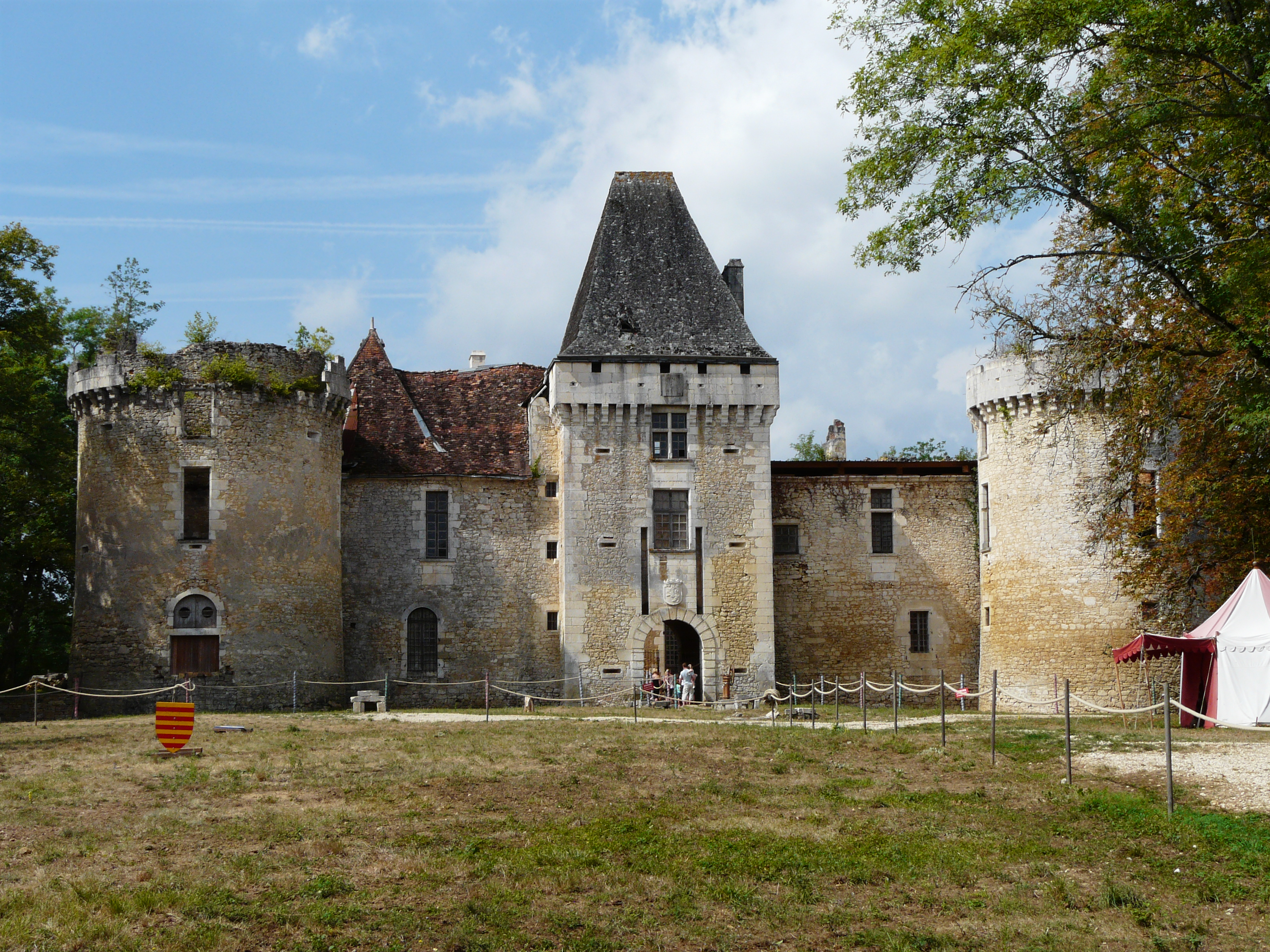 La façade nord-est du château de Laxion, Corgnac-sur-l'Isle, Dordogne, France.